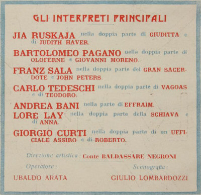 Dalla brochure pubblicitaria stampata nel 1928. Coll. Museo Nazionale del Cinema, Torino.